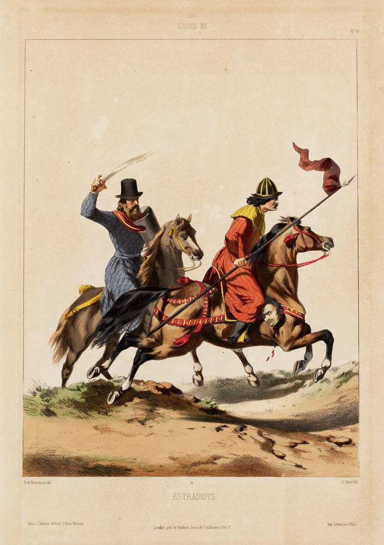 Эстрадиоты (страдиоты).